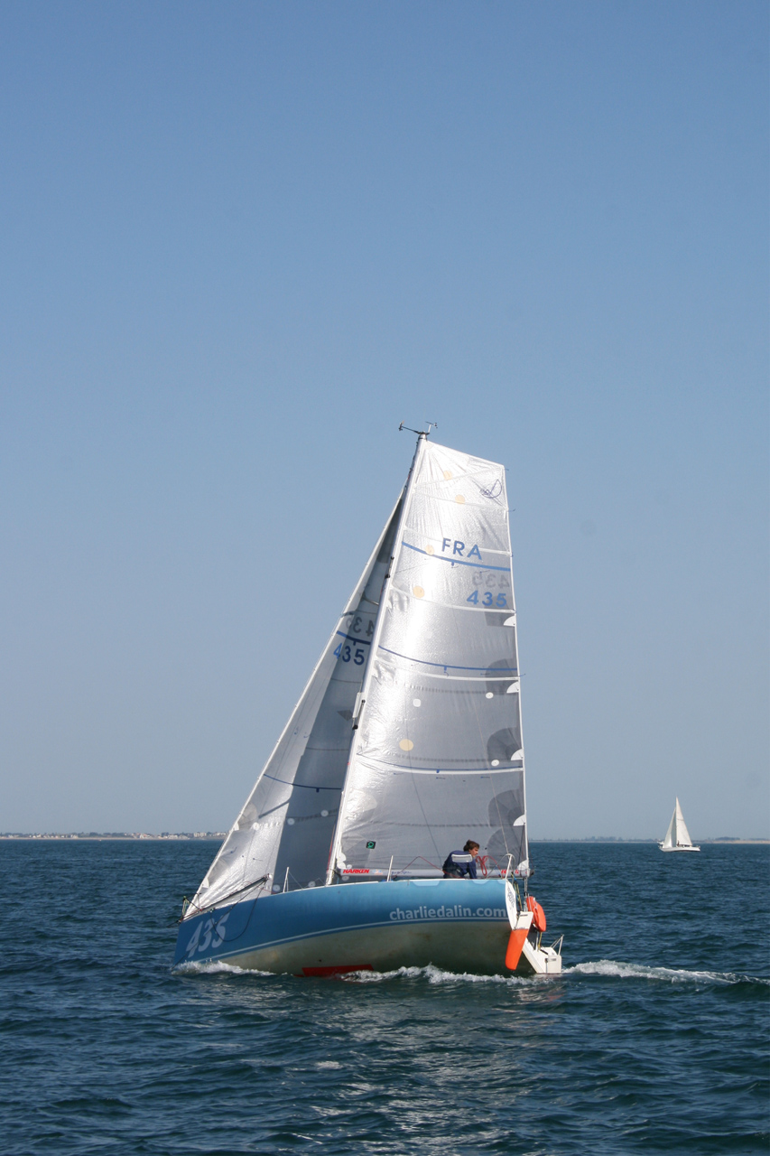 Mini 6.50 - FRA 435 en entrainement dans la baie de la Rochelle